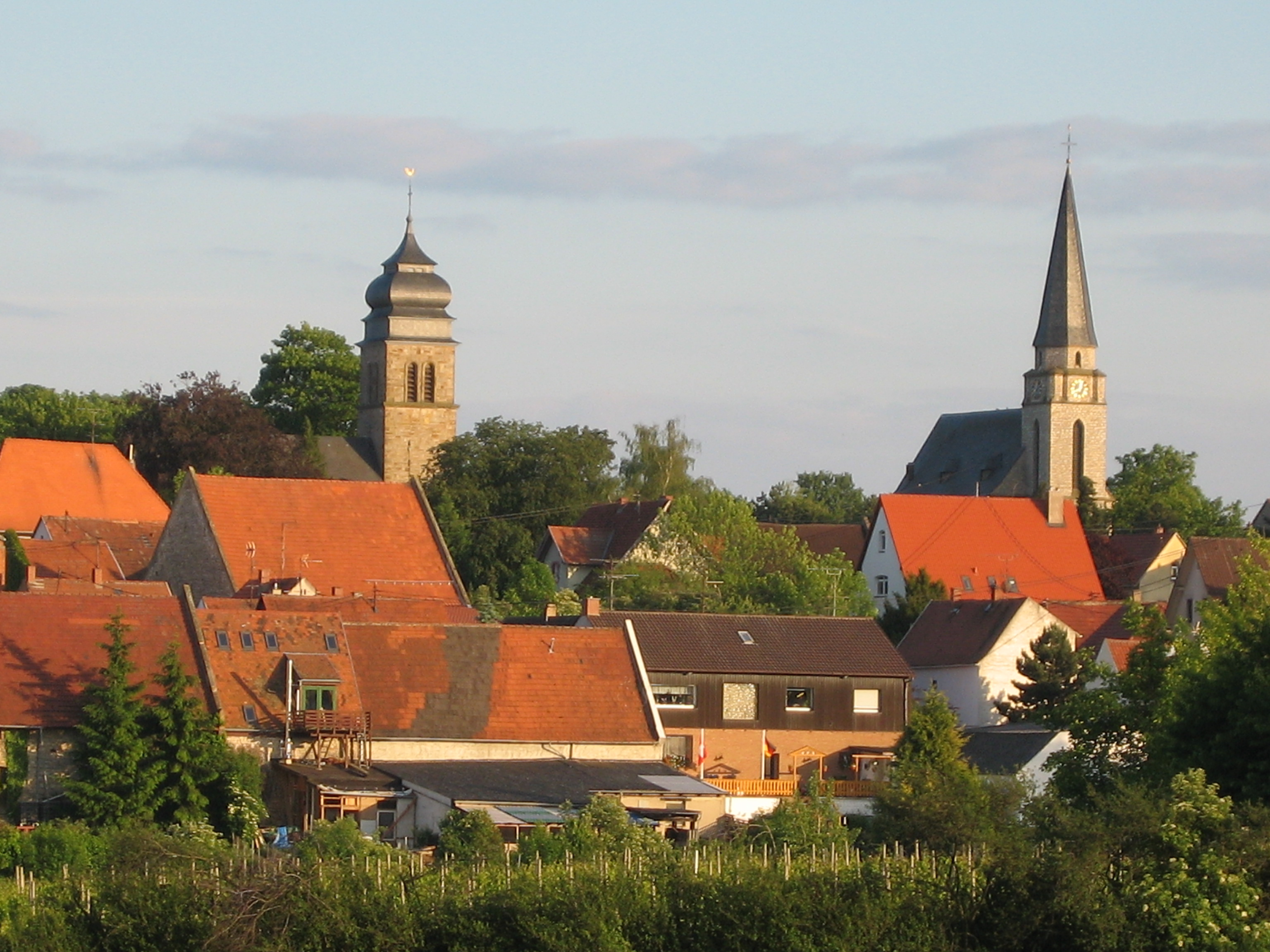 Ober-Floersheim, Ortsansicht mit den beiden Kirchen Foto: Tobias Schaefer